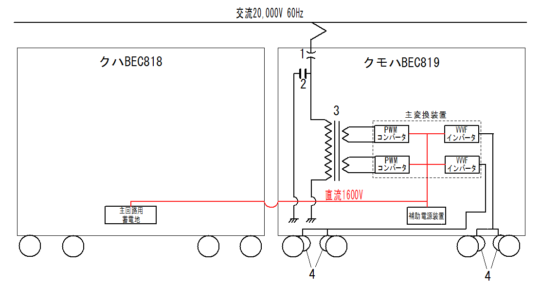 BEC819交流架線式蓄電池電車のの主回路の見取り図。1交流遮断機、2交流避雷器、3変圧器、4主電動機